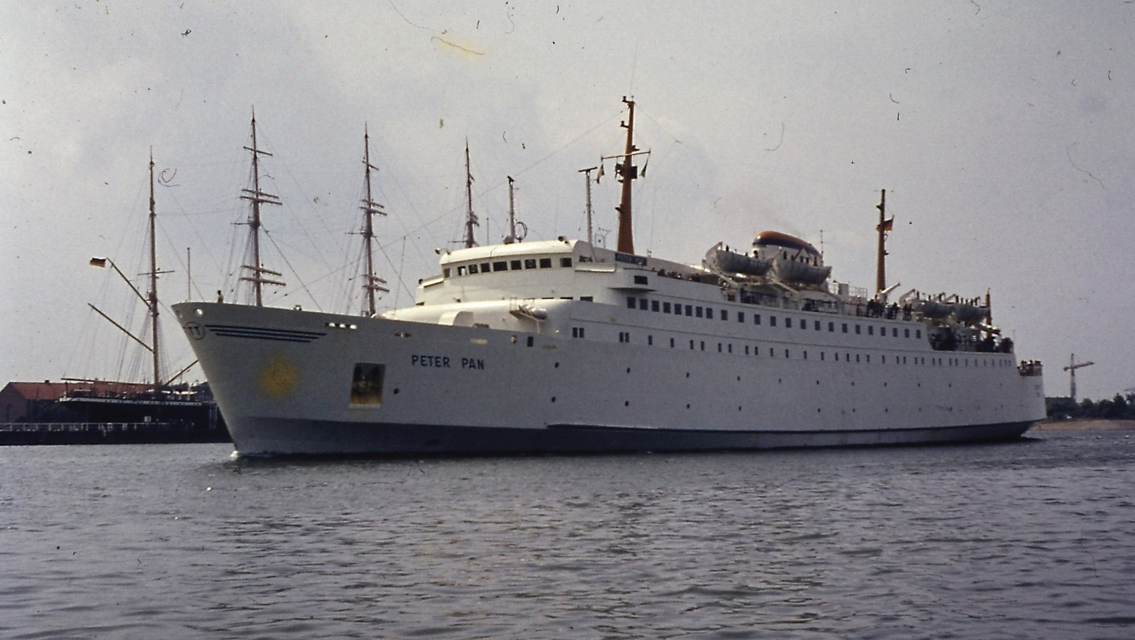 Peter Pan, Fährschiff der TT-Line aus Lübeck